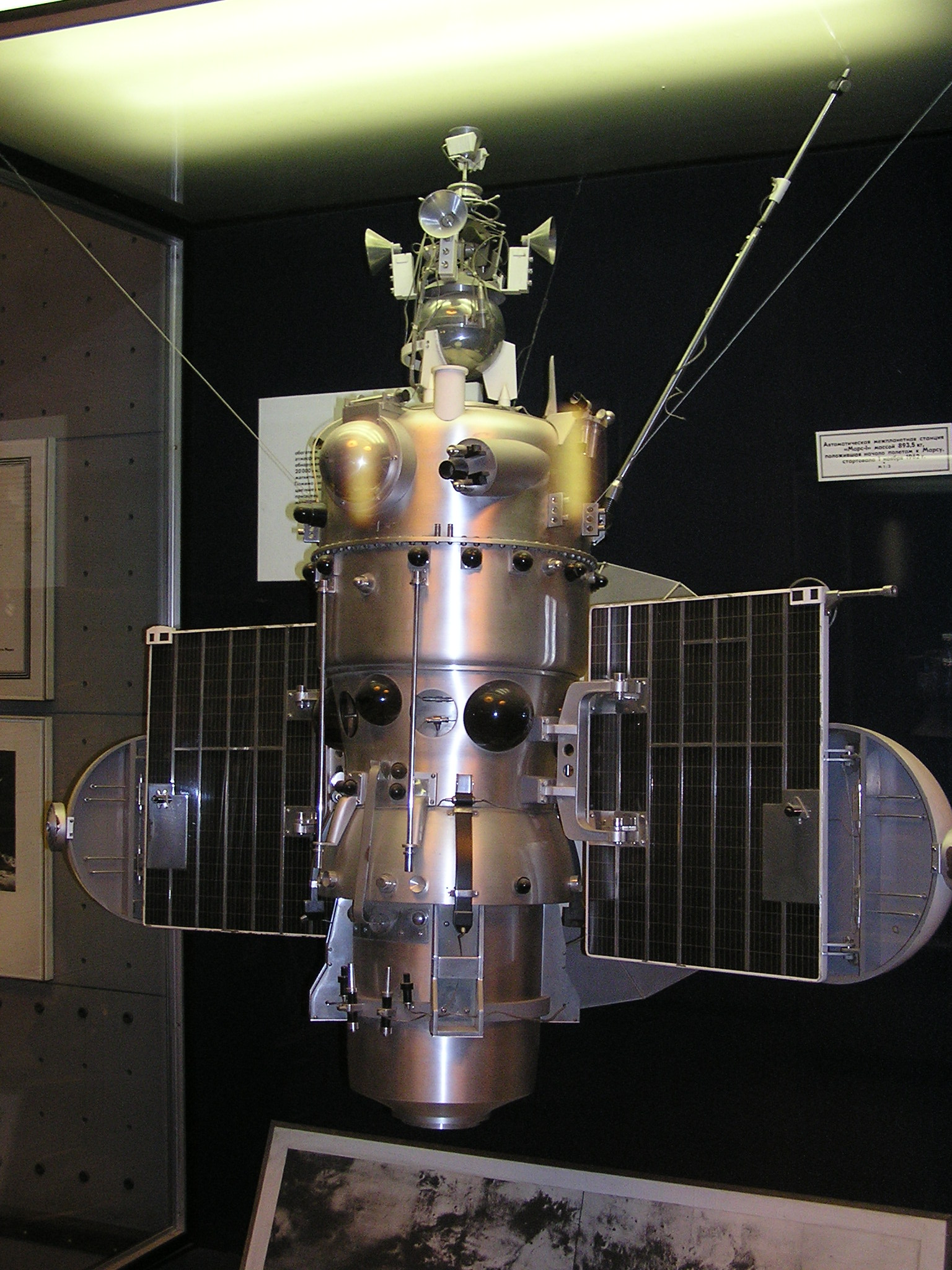 Музей космонавтики и ракетной техники (в Иоанновском равелине Петропавловской крепости). Модель автоматической межпланетной станции Марс 1